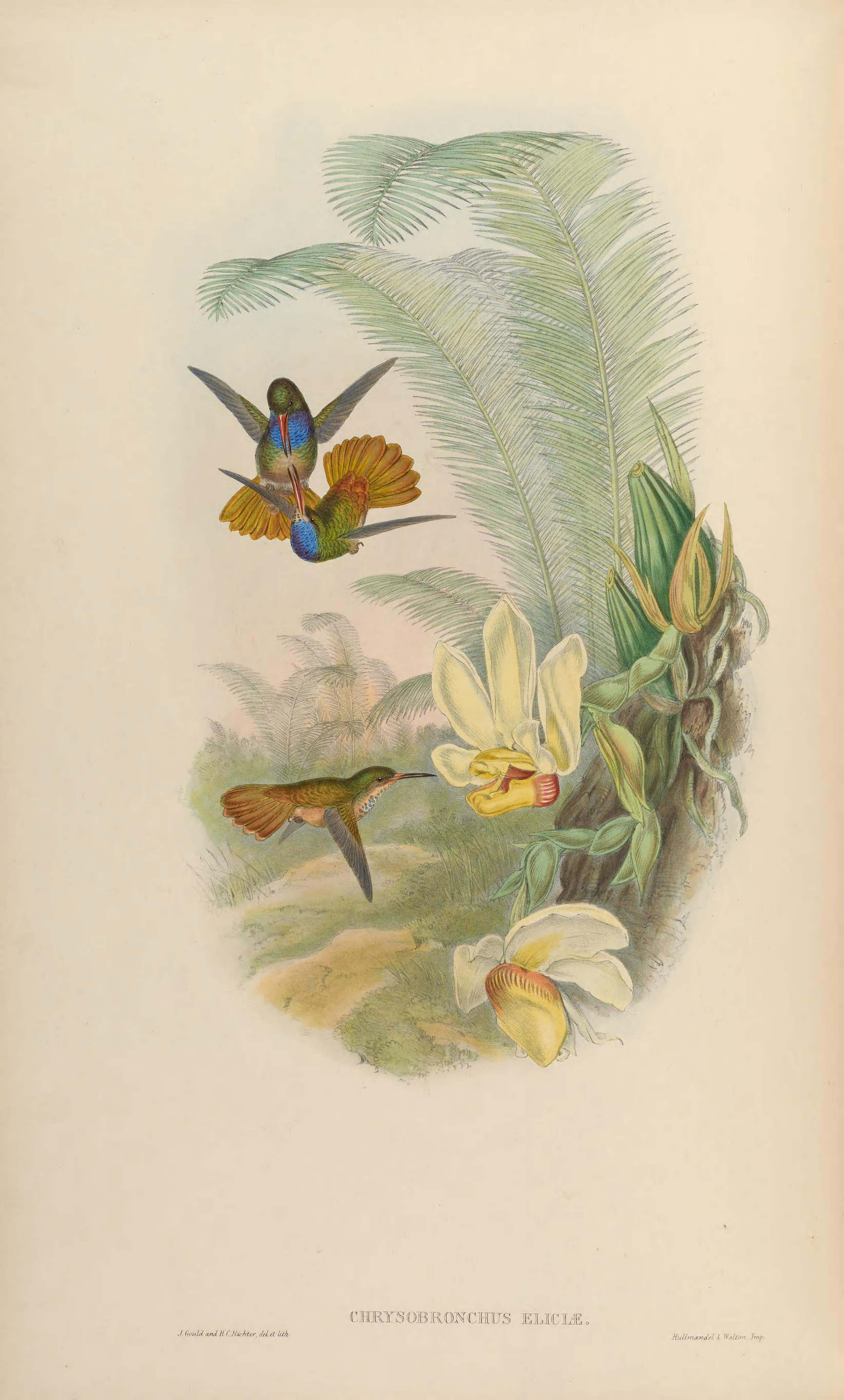 Chrysuronia eliciae = Hylocharis eliciae[1]